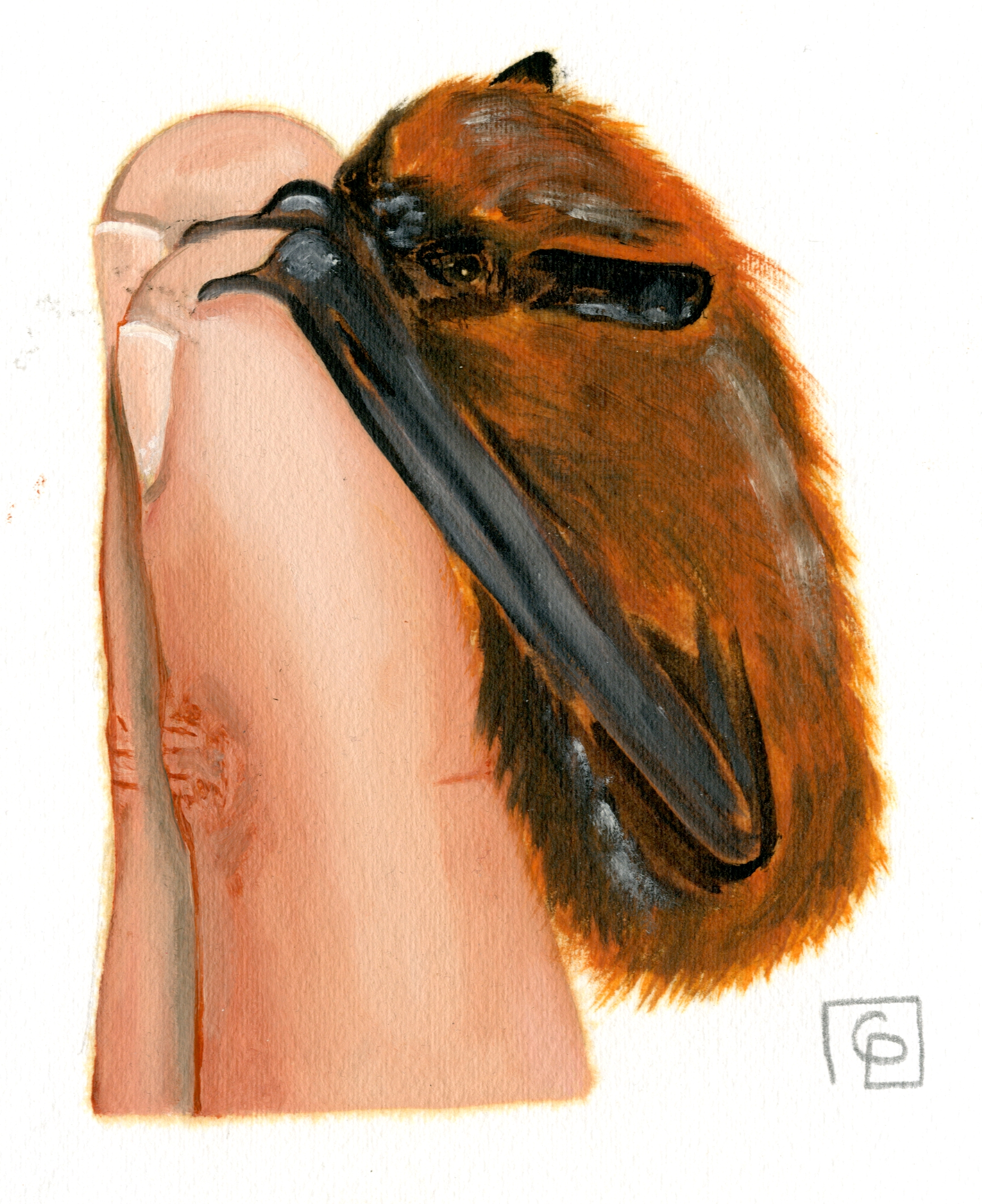 Peinture à l'huile d'une pipistrelle, par Carole Pillore, 2014.